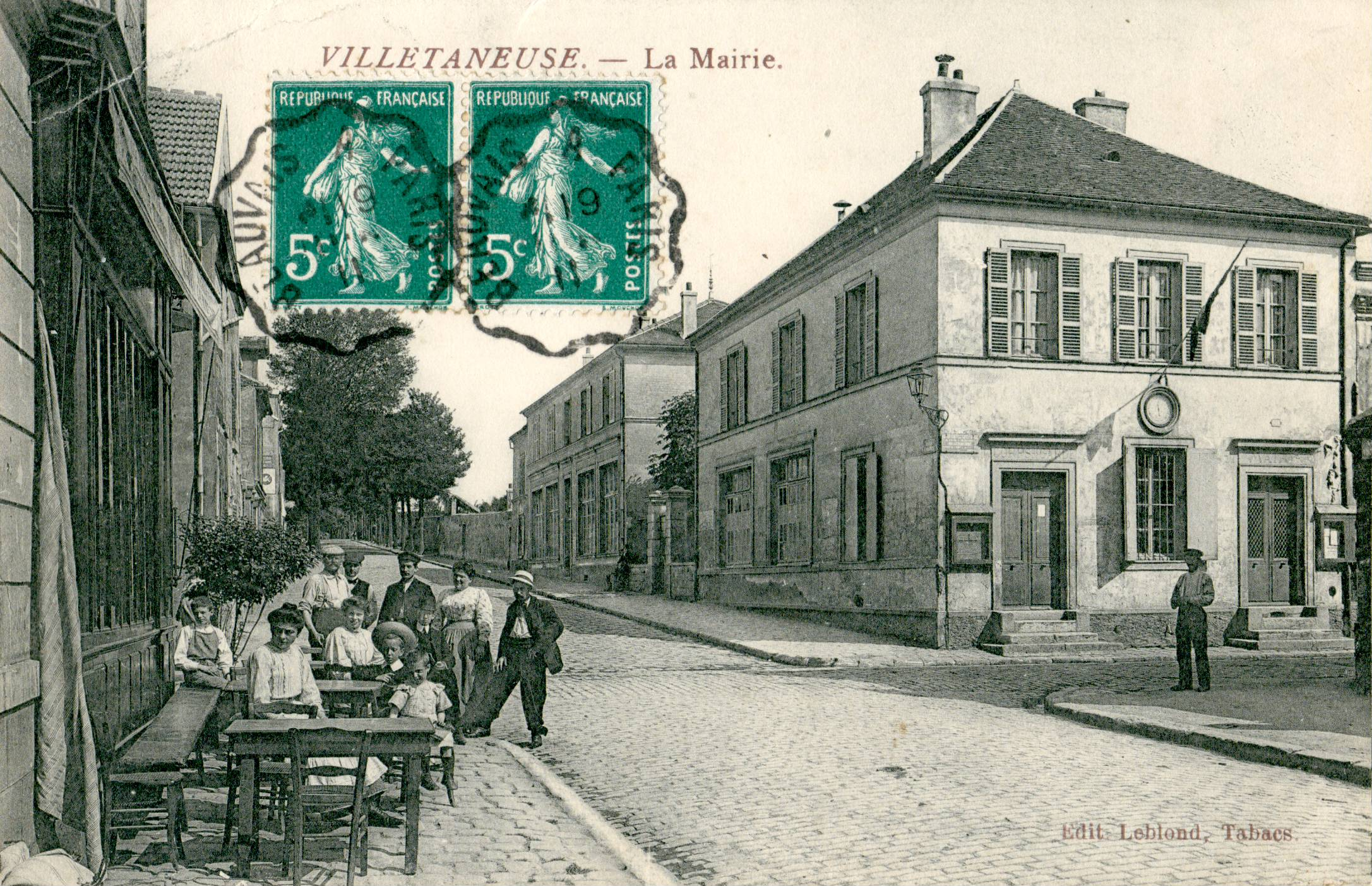 Carte postale ancienne éditée par Leblond : VILLETANEUSE : La Mairie (À l'angle, la Mairie-École des garçons, au second plan, l'extension de l'école des filles).